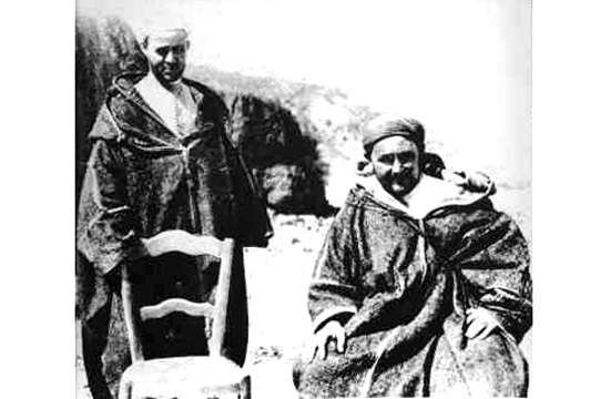 Los hermanos Abd el-Krim, en un punto indeterminado del Rif hacia 1920